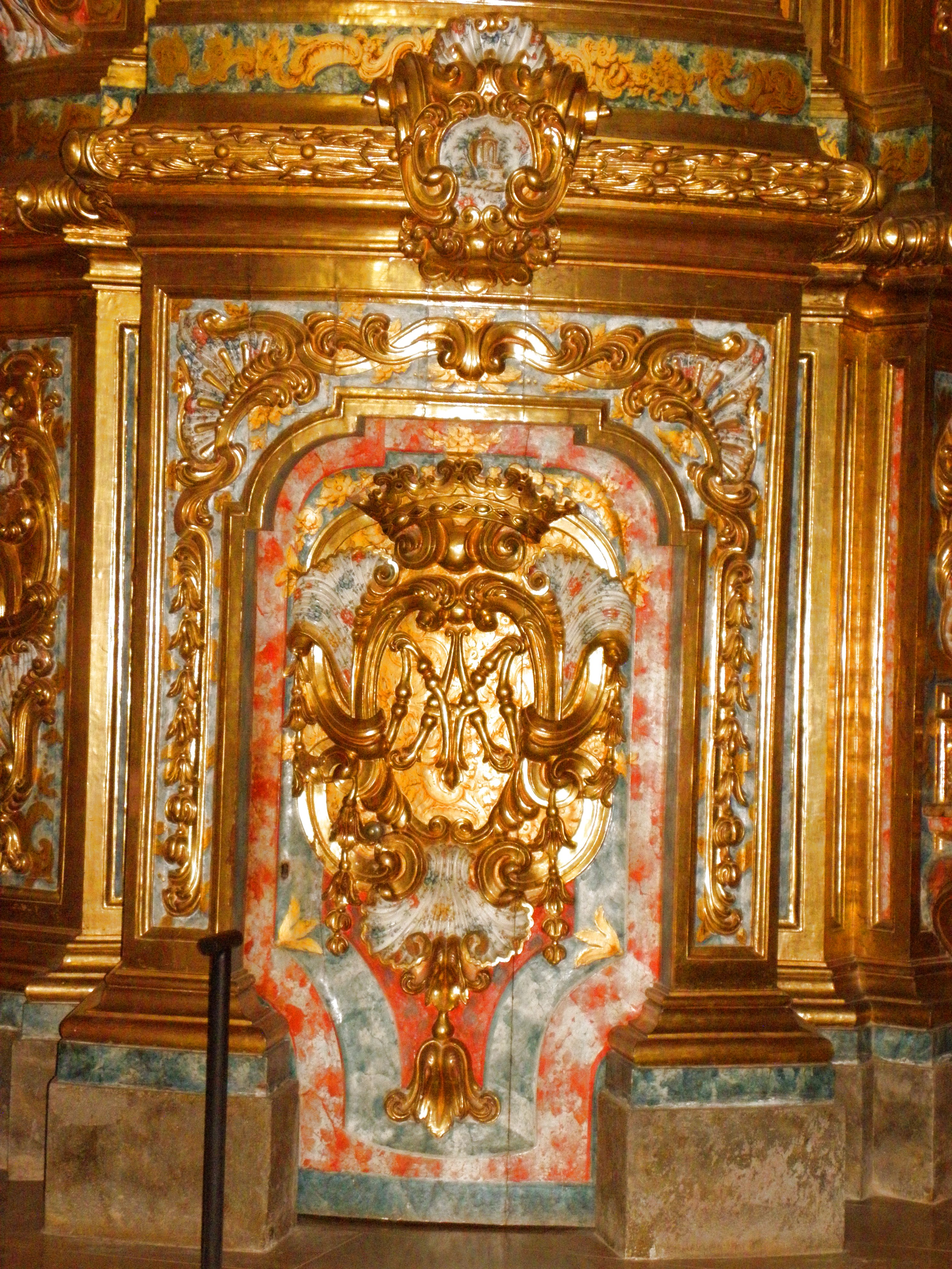 Retaule barroc del Miracle (Riner, Solsonès). Una de les dues portes d'accès al cambril